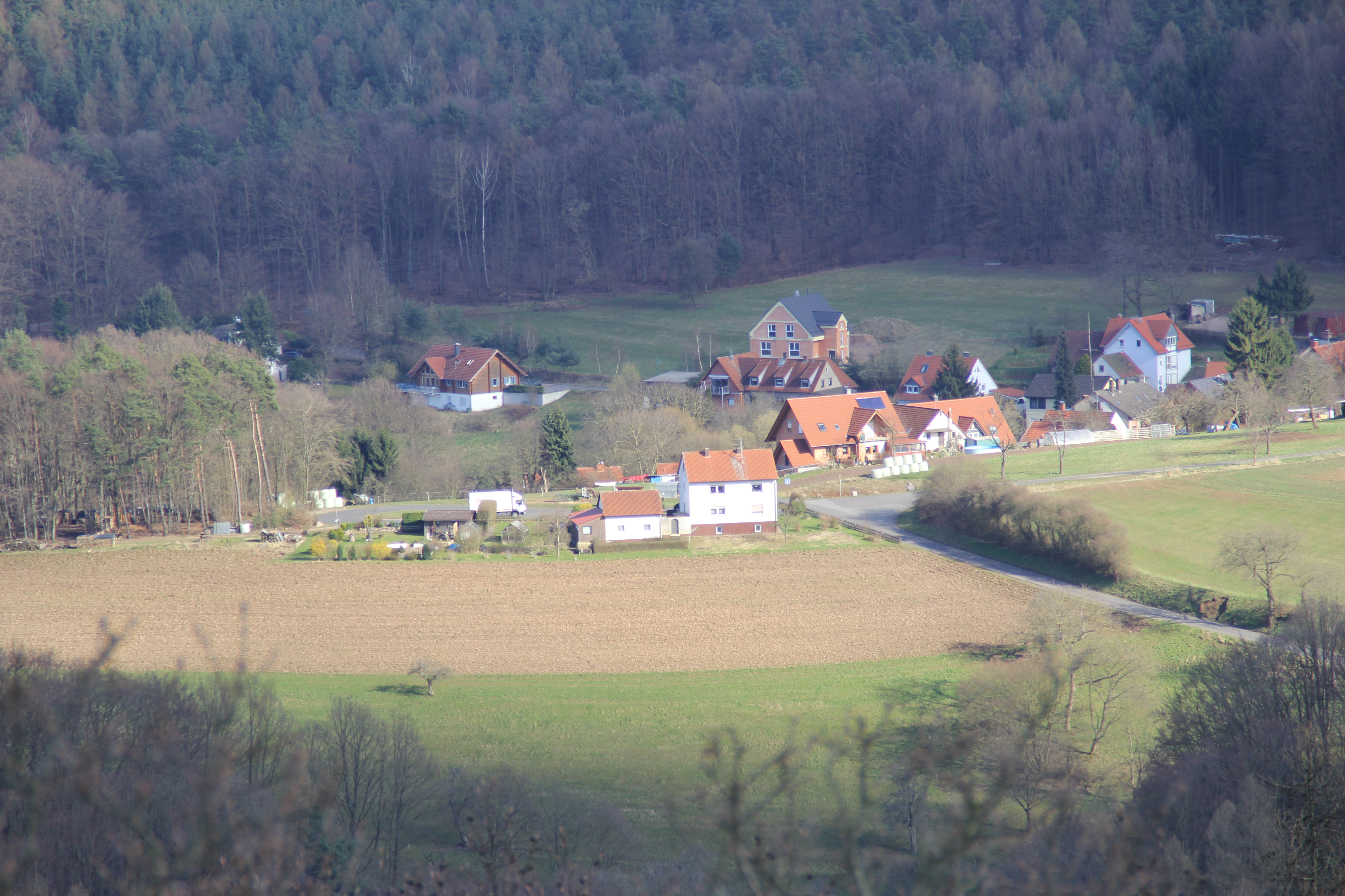 Kleinhemsbach im Landkreis Aschaffenburg, Bayern. Gesehen vom Ludwigsturm auf dem Hahnenkamm bei Alzenau.